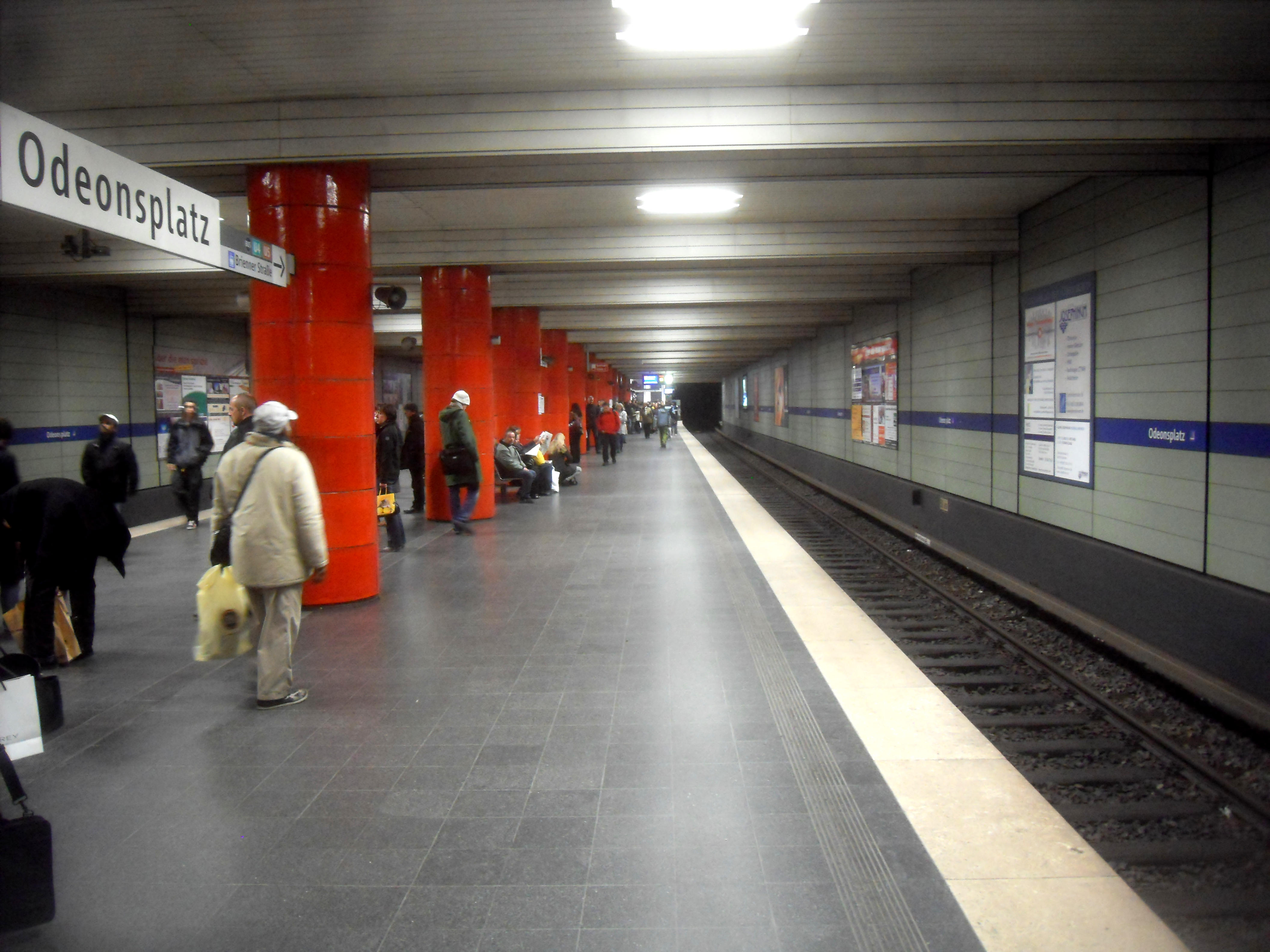 Der U-Bahnhof Odeonsplatz der Linien U 3 und U 6 der Münchner U-Bahn in Bayern (Deutschland)